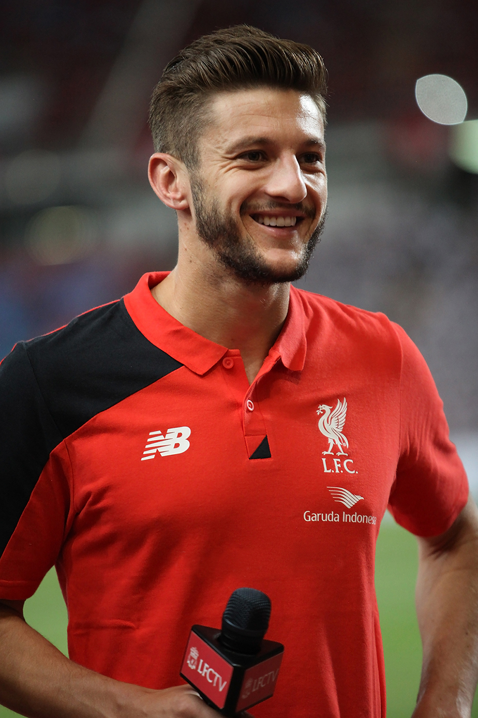 Adam Lallana during 2015 LFC Tour in Bangkok